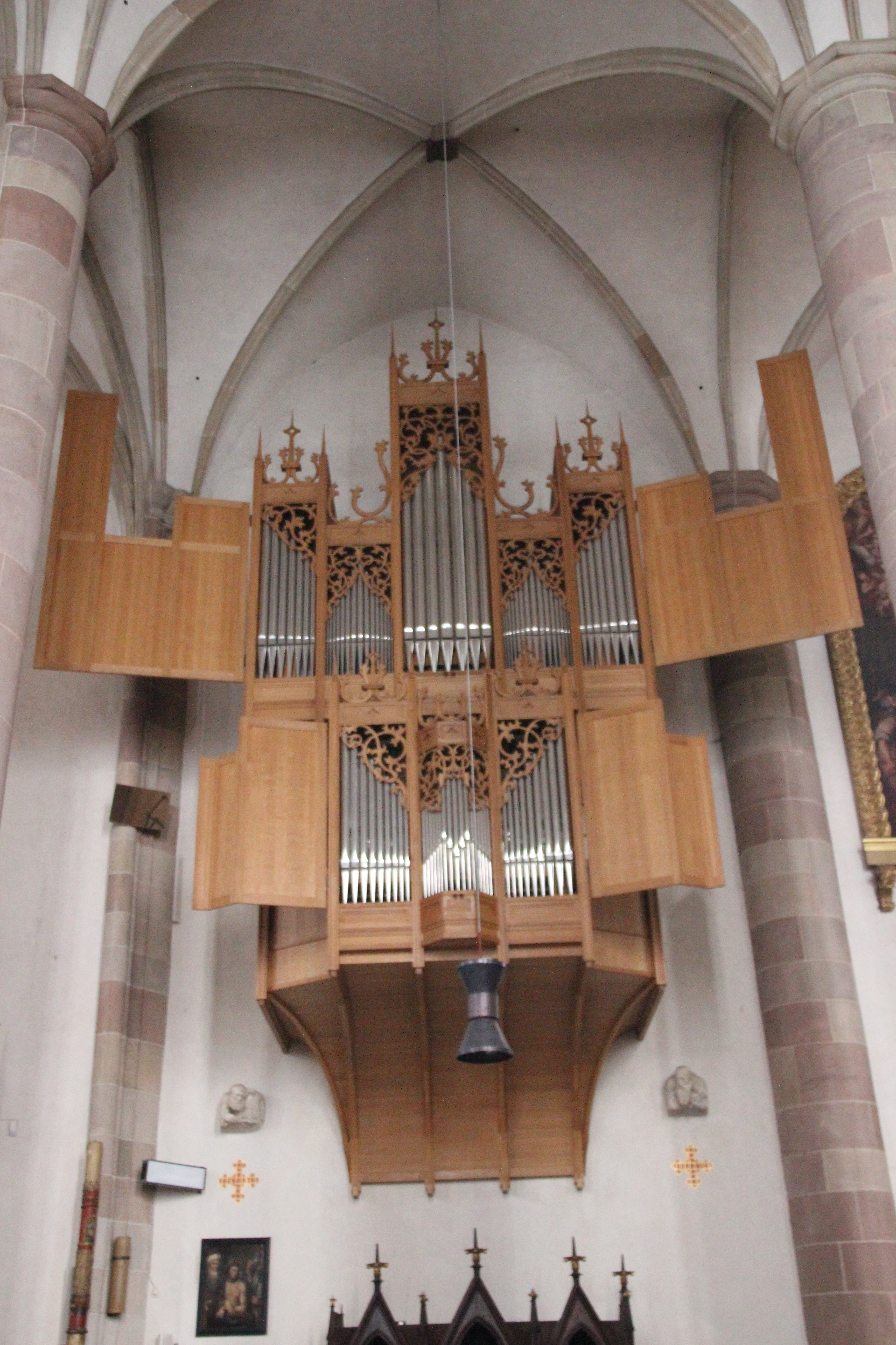 Pfarrkirche St. Pauls - Orgel im rechten Kirchenschiff